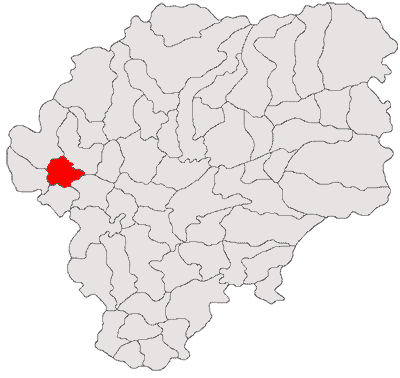 Categorie:Hărţi ale judeţului Bistriţa-Năsăud